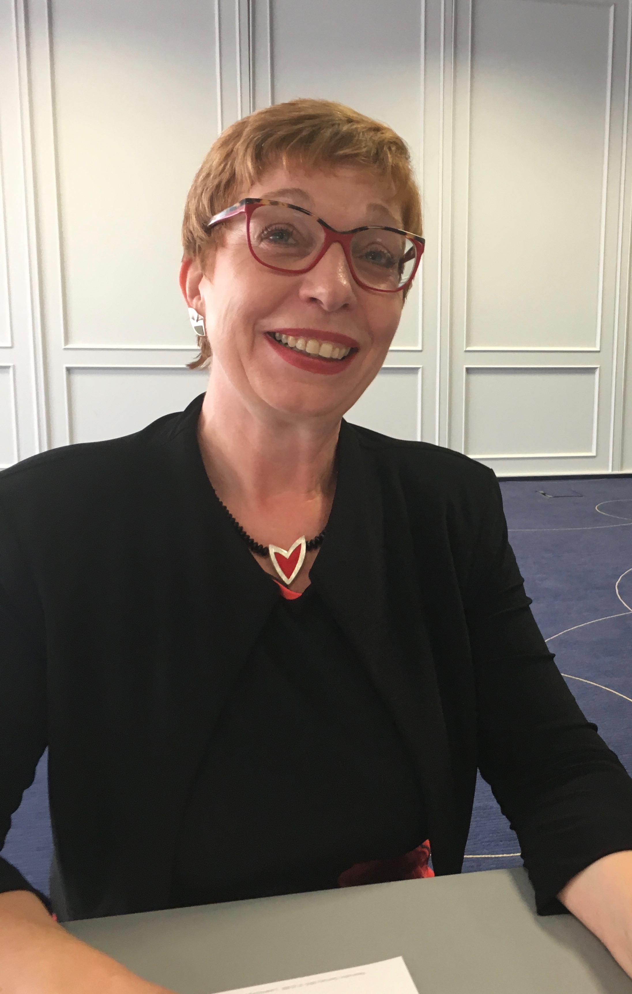 Susanne Lin-Klitzing